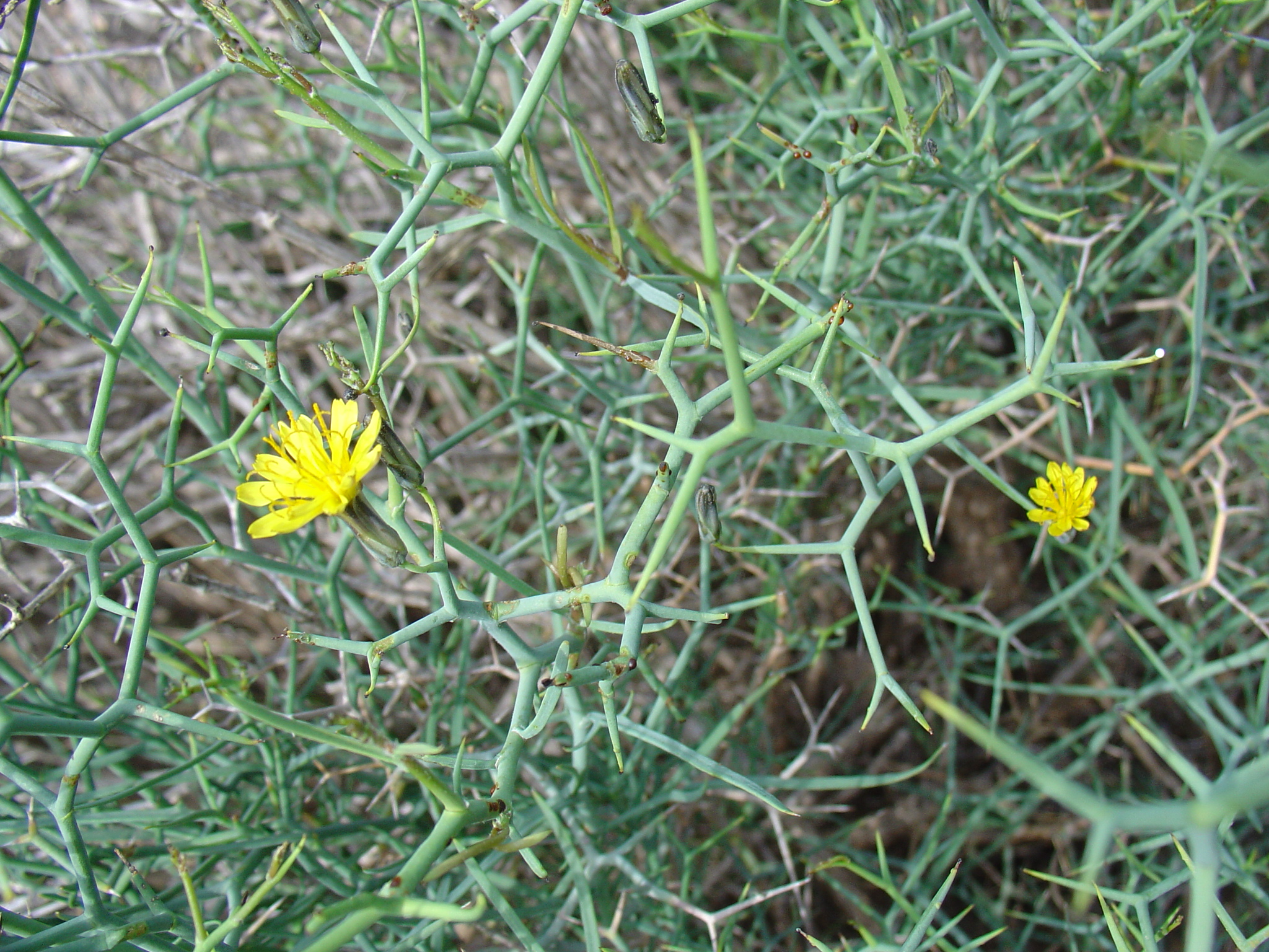 Launaea arborescens from Sª del Roldán, Cartagena, Murcia, Spain